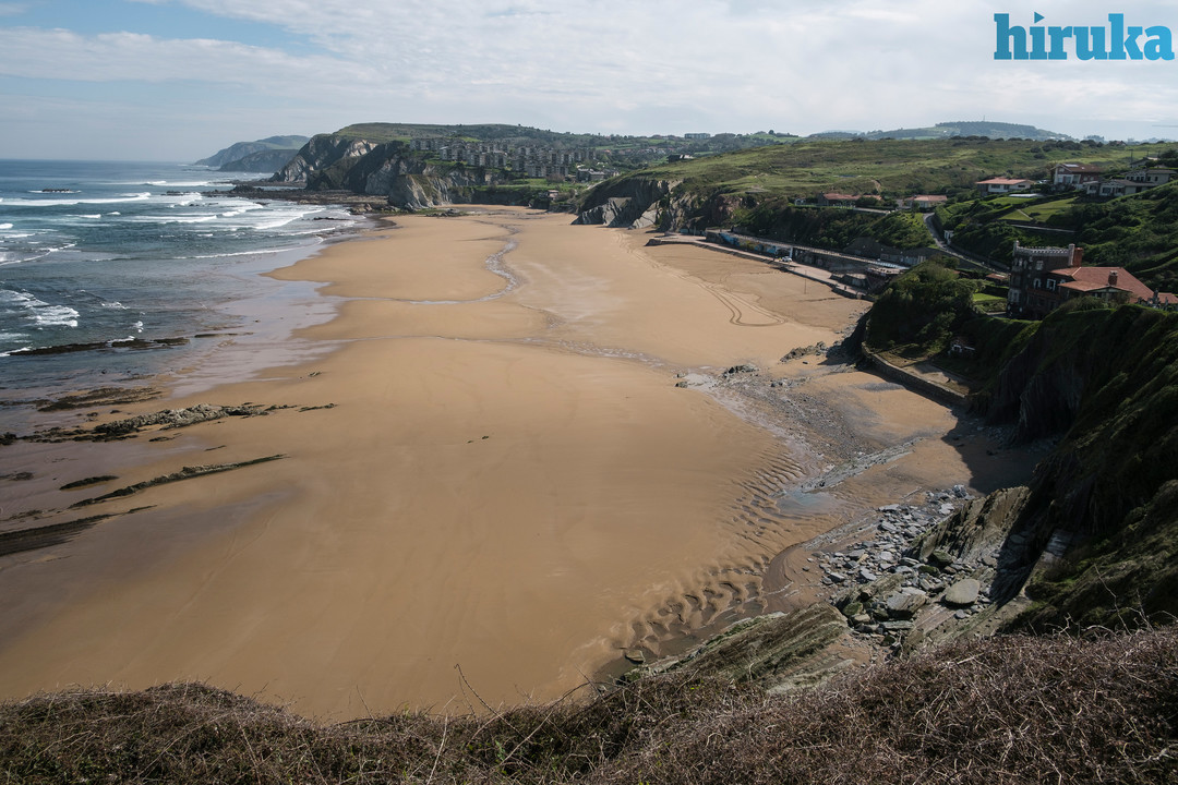 Orain arte pentsaezinak ziren irudiak utzi dizkigu koronabirusaren krisialdiak egunotan: pasealeku eta hondartza hutsak; erosketak egiteko ilara etengabeak; aurpegia erdizka estaltzen dituzten maskarak nonahi... Kaletik etxera; gizartearen bizitza balkoietan ikus daiteke orain, etxealditik ihes egiteko eguzkiaren izpiak harrapatu guran. Guztiak hemen